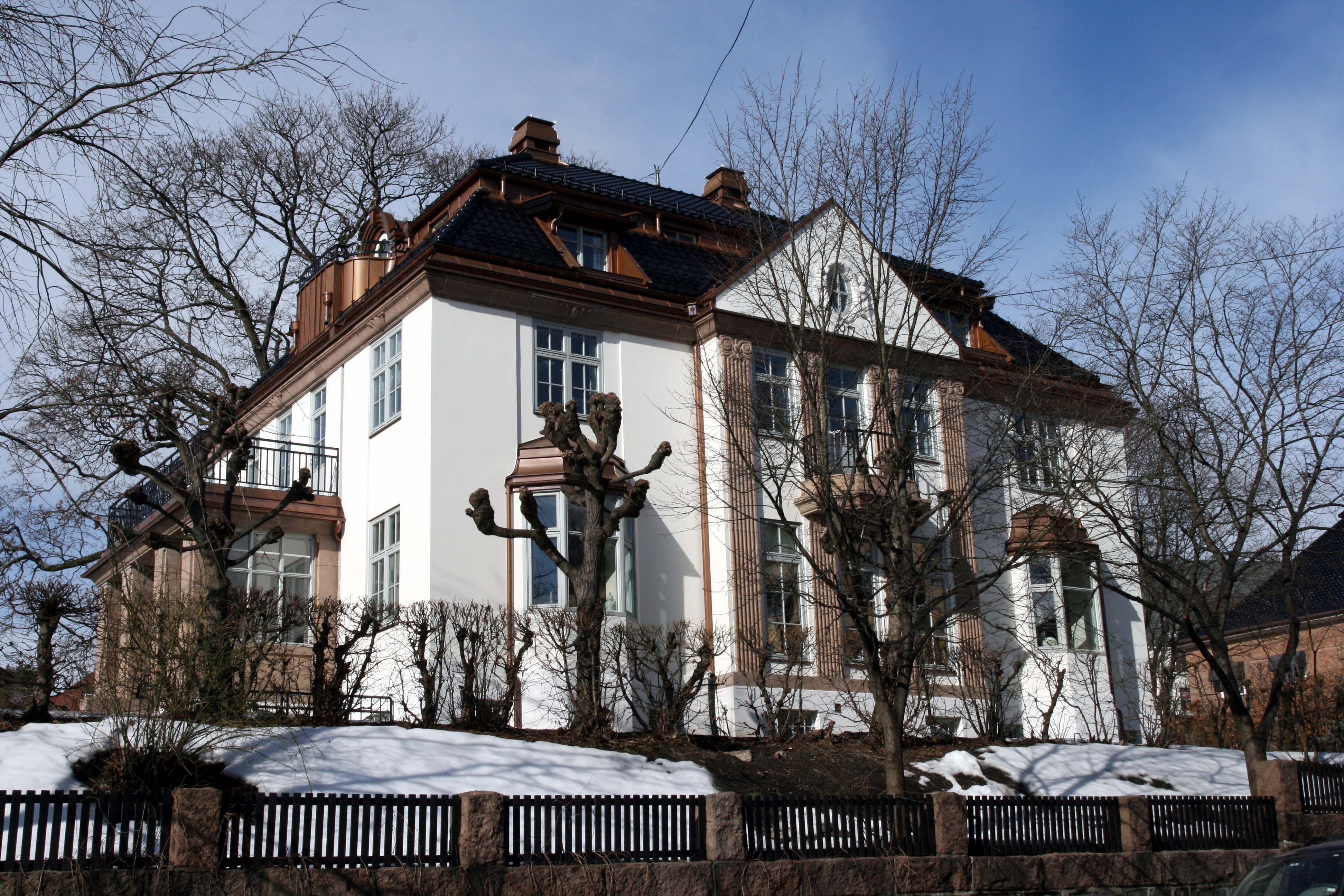 Frederik Stangs gate 20 på Frogner i Oslo. Her holder Den norske tannlegeforening til. Bygning fra 1916, ark. E. Nielsen.